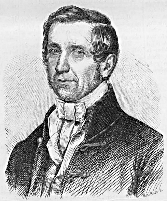 Szemere Pál (1785–1861) költő, akadémikus. Rusz Károly metszete (Vasárnapi Ujság, 1864. február 14.)